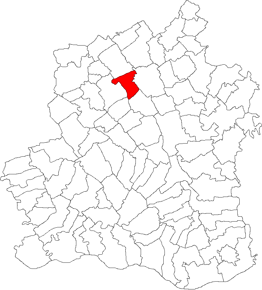 Categorie:Hărţi ale judeţului Teleorman